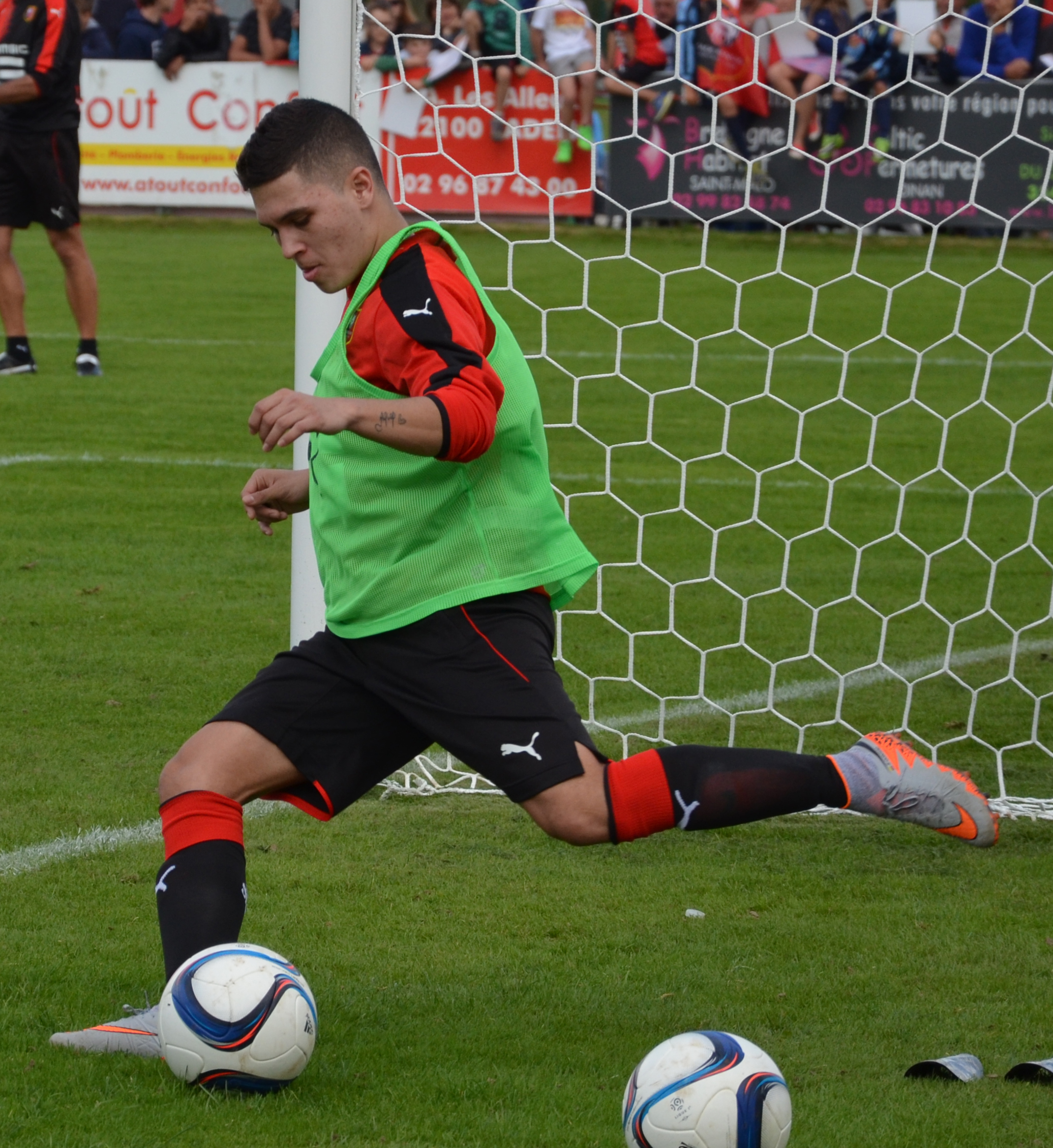 Photographie prise lors d'un entraînement du Stade rennais délocalisé à Dinan. Ici, Juan Fernando Quintero.